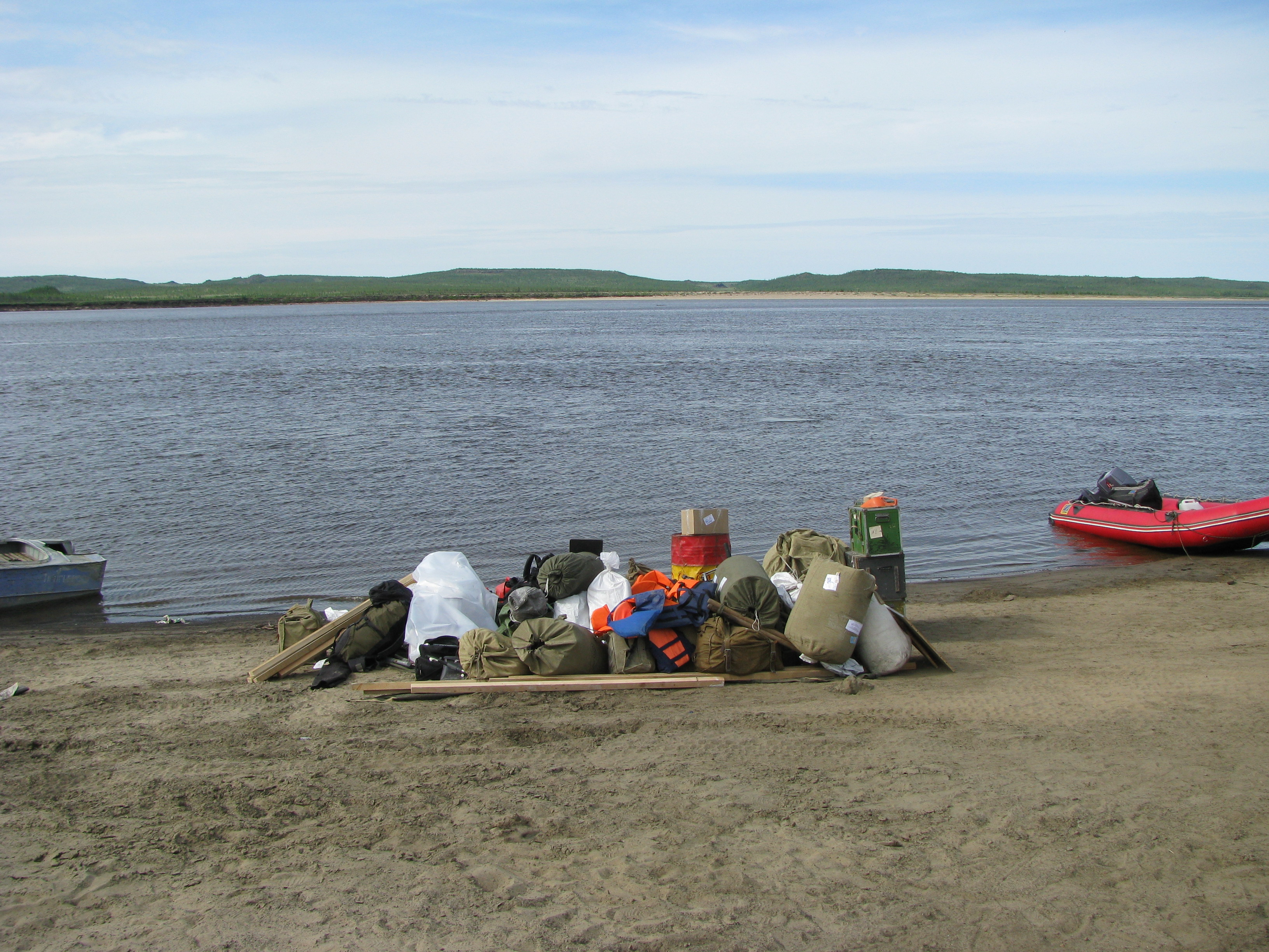 Автор: Vladislav Kyamyarya